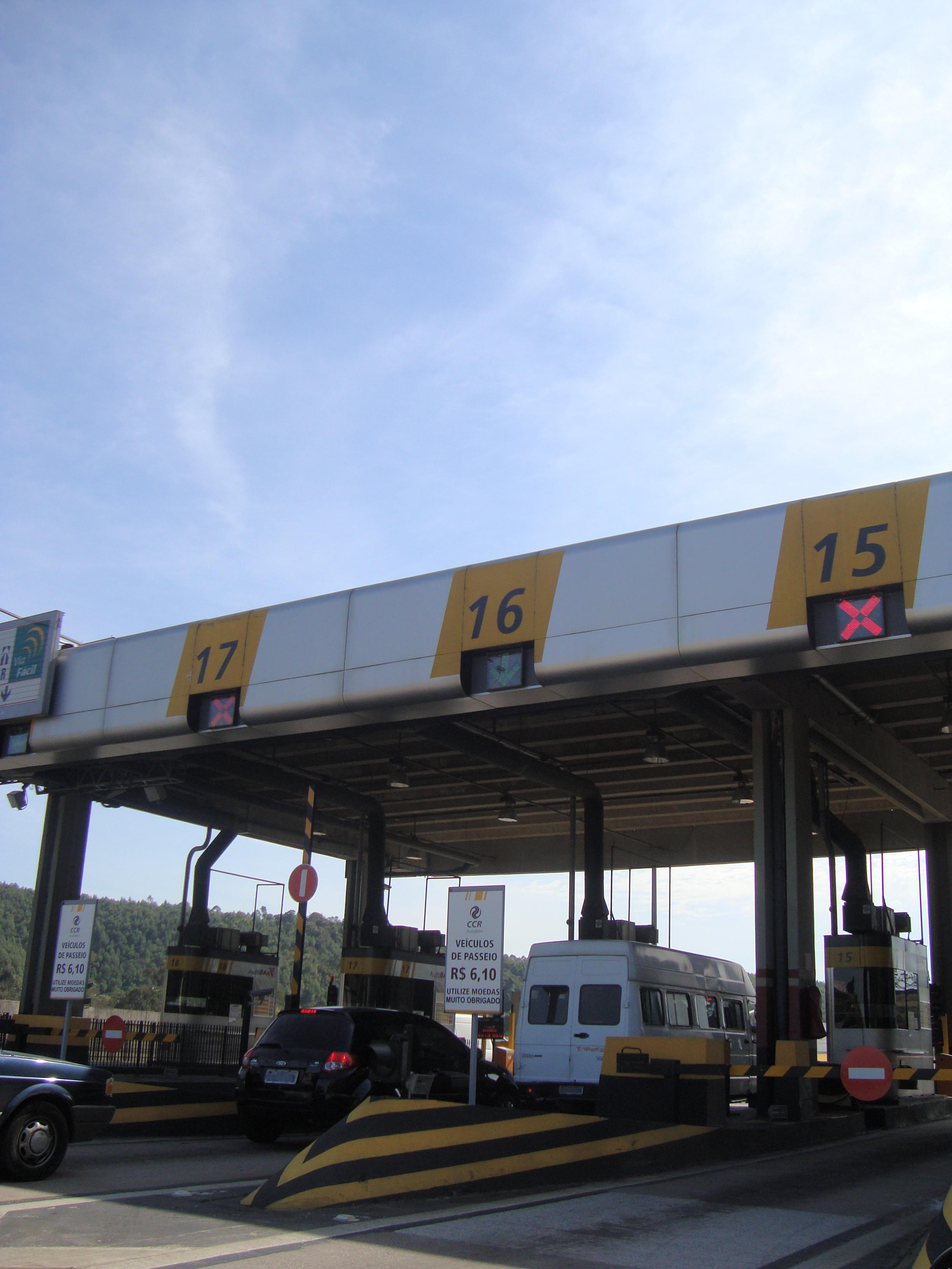 Foto do Pedágio da AutoBan em São Paulo